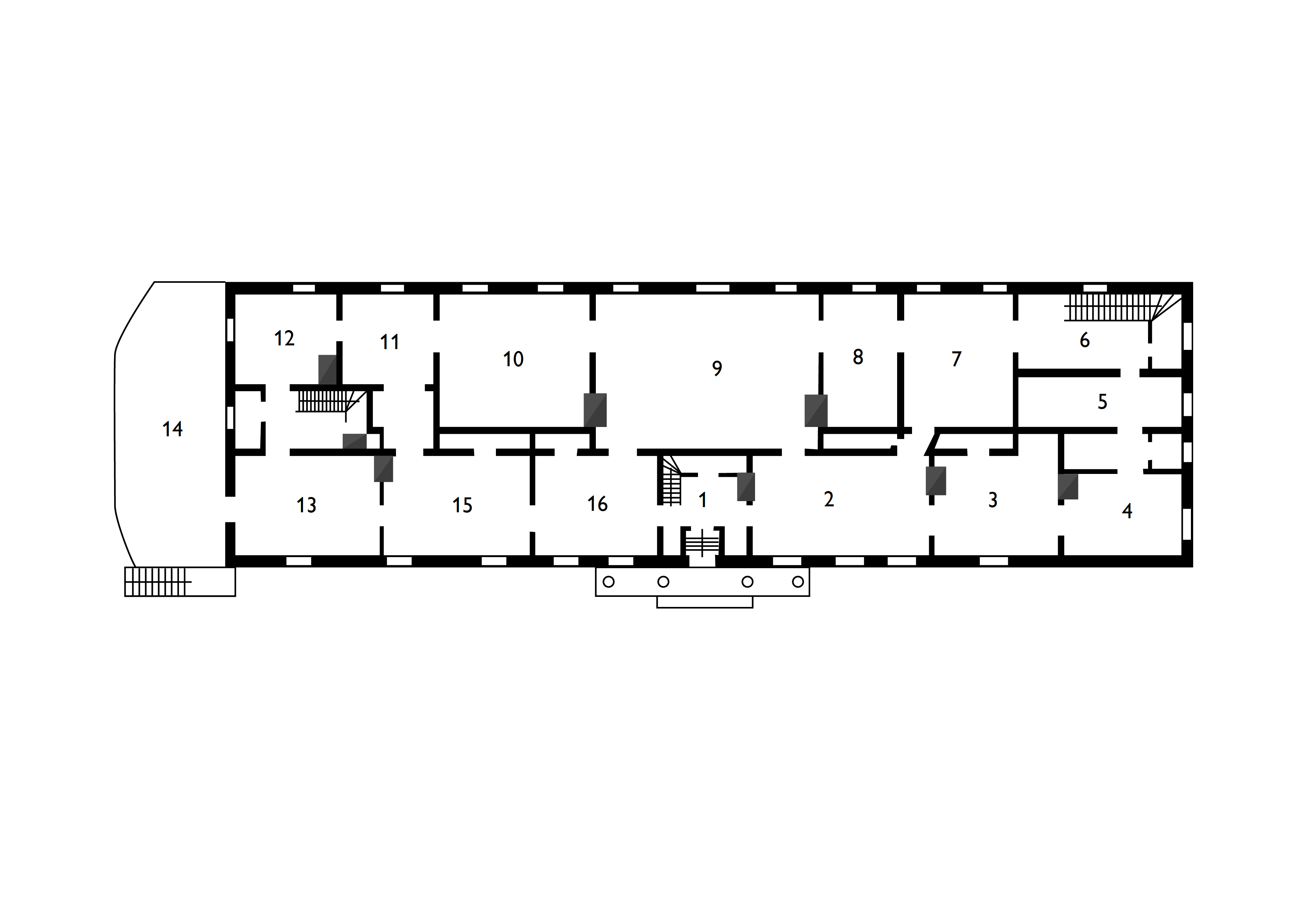 Einmanni mõisa ruumijaotus. Algjoonis O. Bongilt, 20. sajandi algus, kserokoopia.